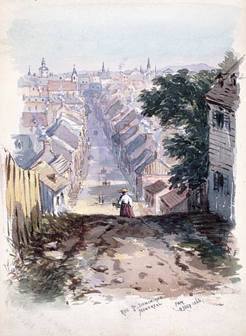 Saint Dominique Street, Montreal